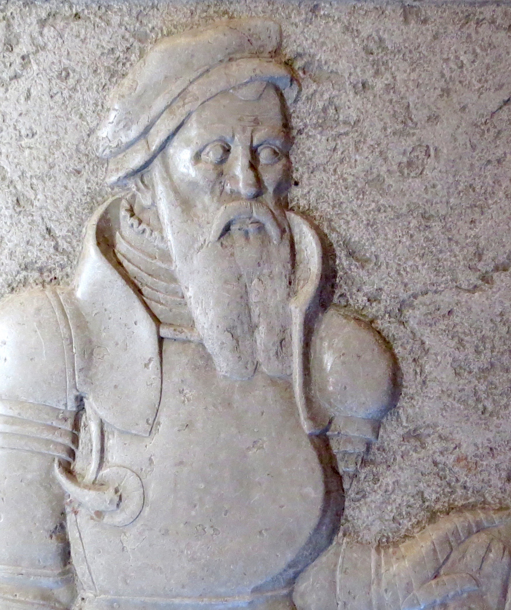 Mourits Olufsen Krognos, detalje fra gravsten i St. Bendts Kirke, Ringsted